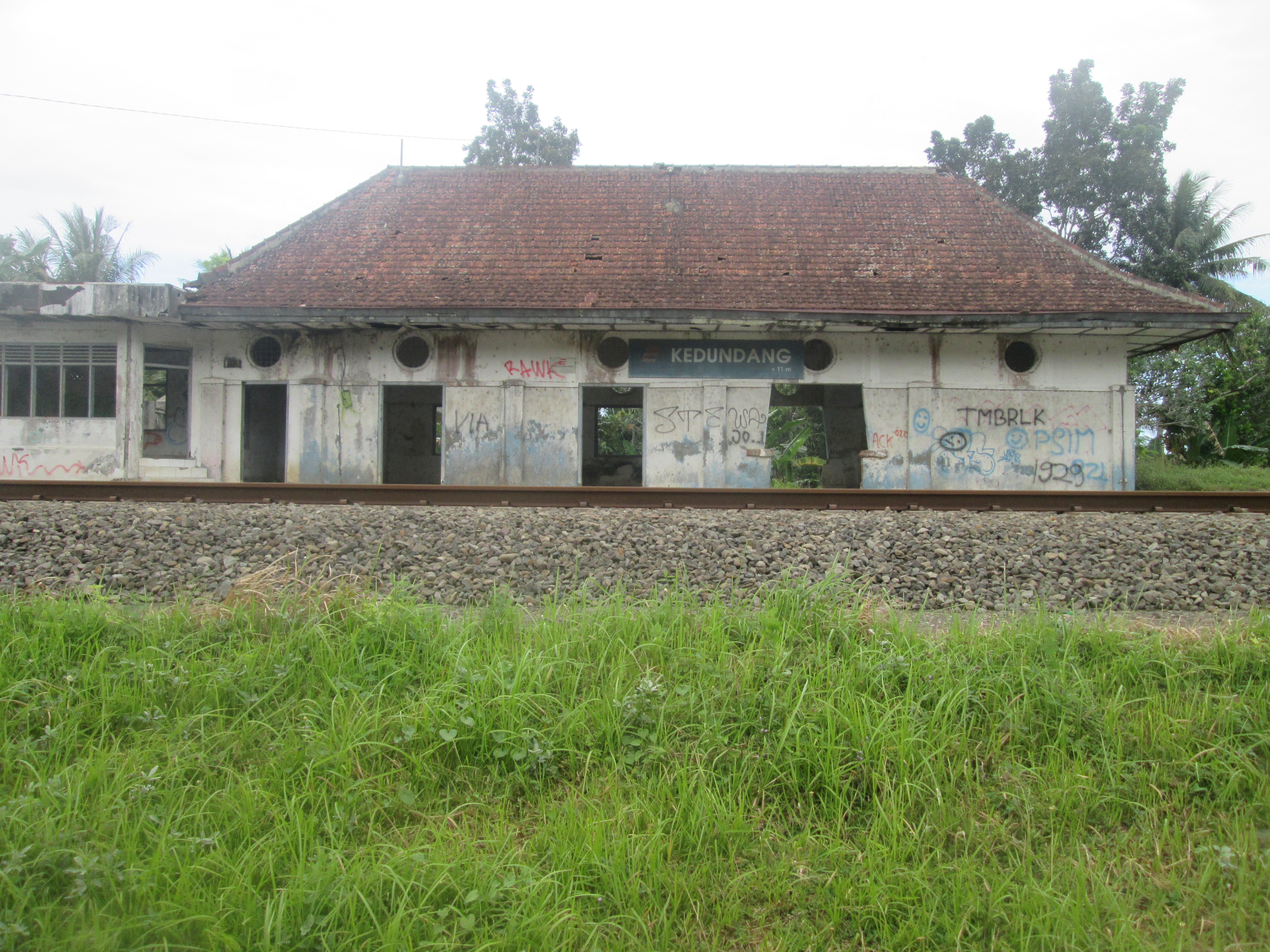 Stasiun Kedundang yang sudah dinonaktifkan, 2016